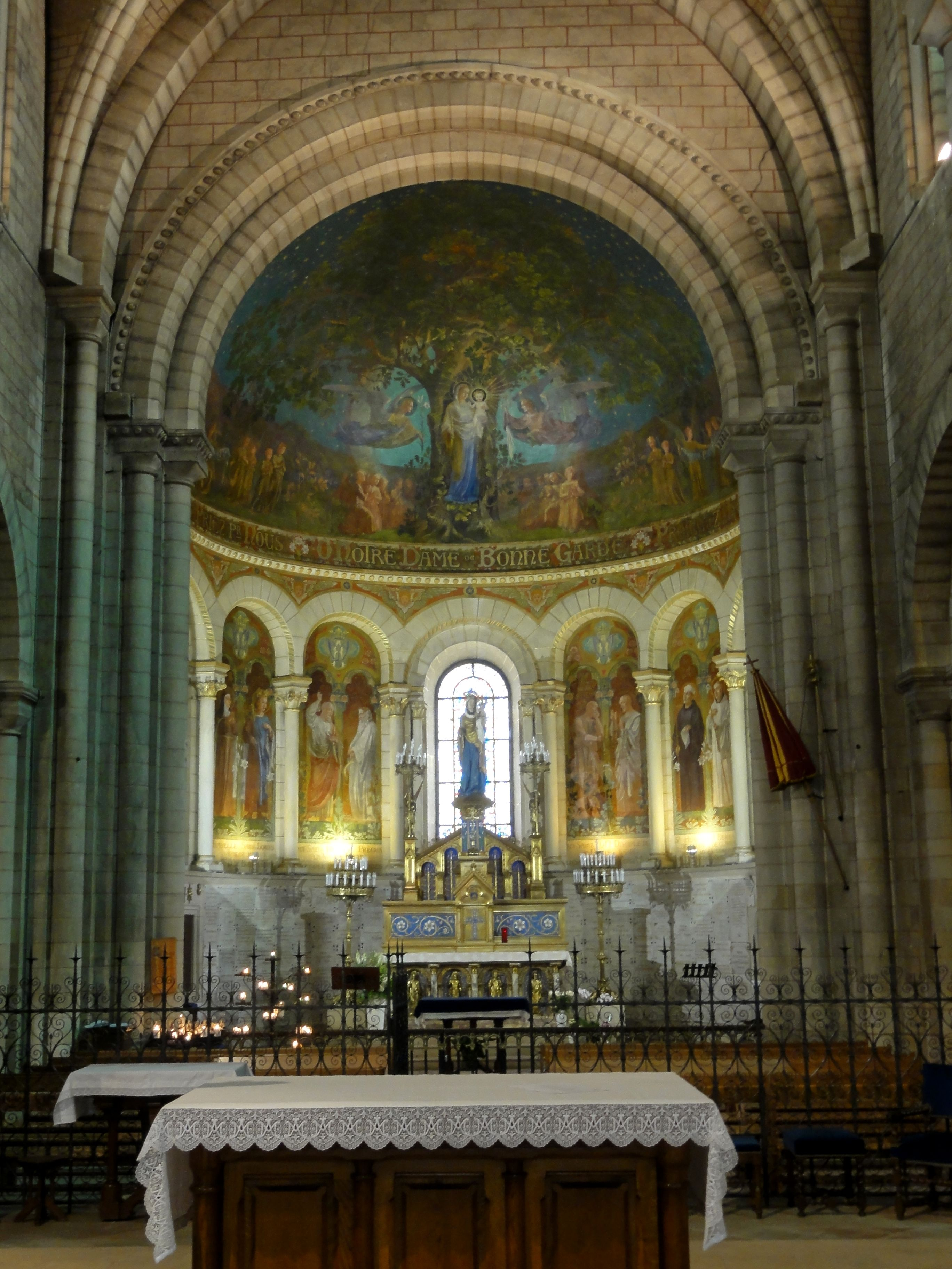 Vue dans le chœur.